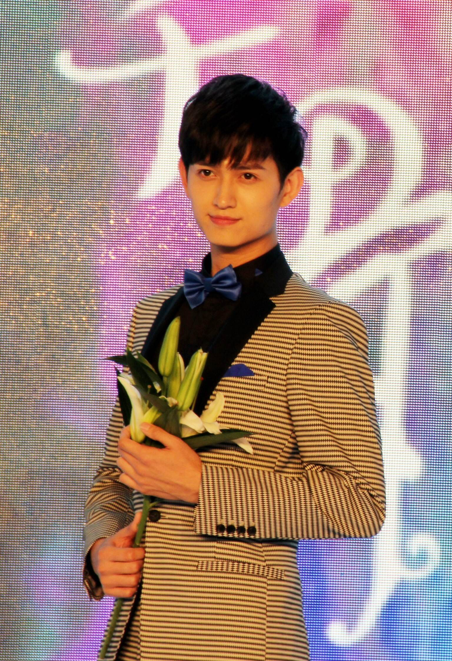 Mã Khả tại buổi họp báo tuyên truyền phim Hoa Thiên Cốt ngày 3 tháng 6 năm 2015